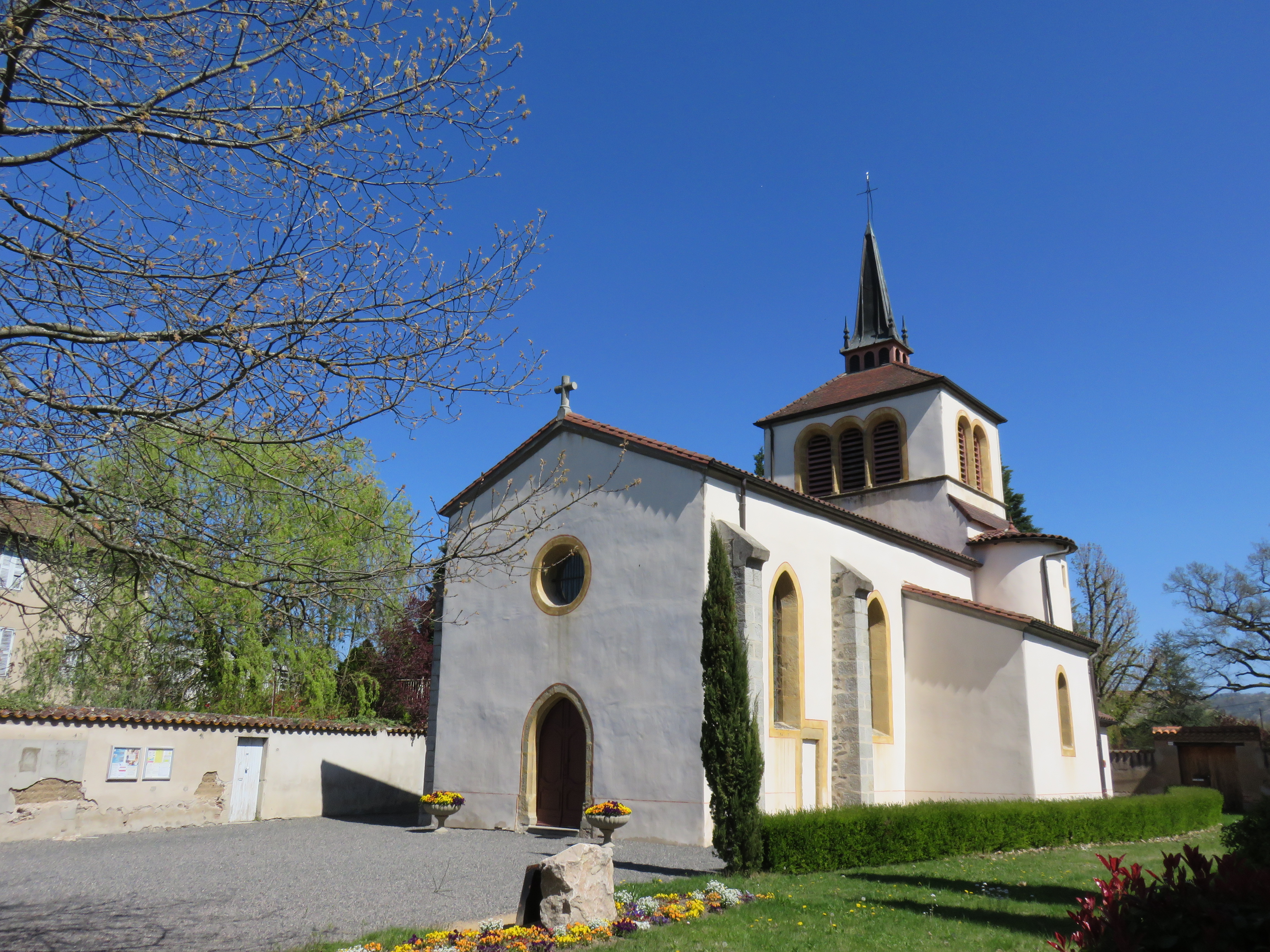 Église Saint-André de Saint-André-le-Puy, dans le département de la Loire.